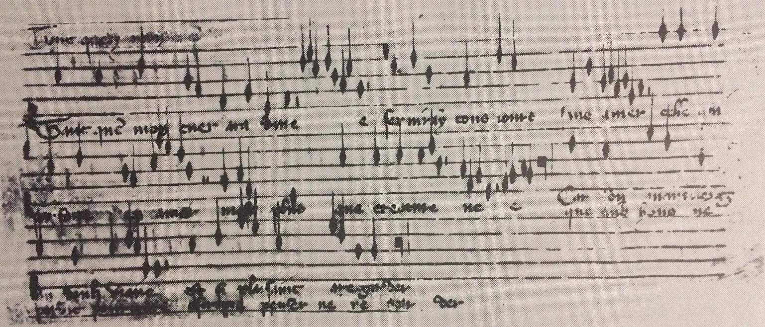 Ivrea Codex, BC 115